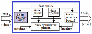 рис4